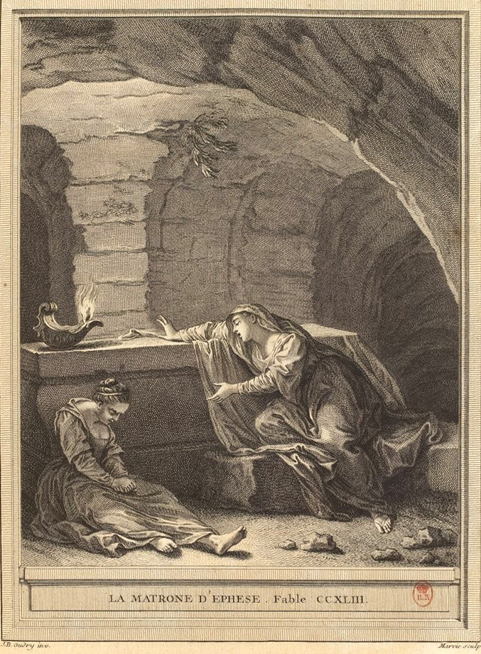 Gravure réalisée par Martin Marvie d'après un dessin de Jean-Baptiste Oudry représentant la fable La matrone d’Éphèse de Jean de La Fontaine (fable 26 du livre XII). Cette gravure est parue dans l'édition complète des fables de La Fontaine, parue en quatre tomes chez l'éditeur Desaint & Saillant, rue saint Jean de Beauvais à Paris, 1755-1759.